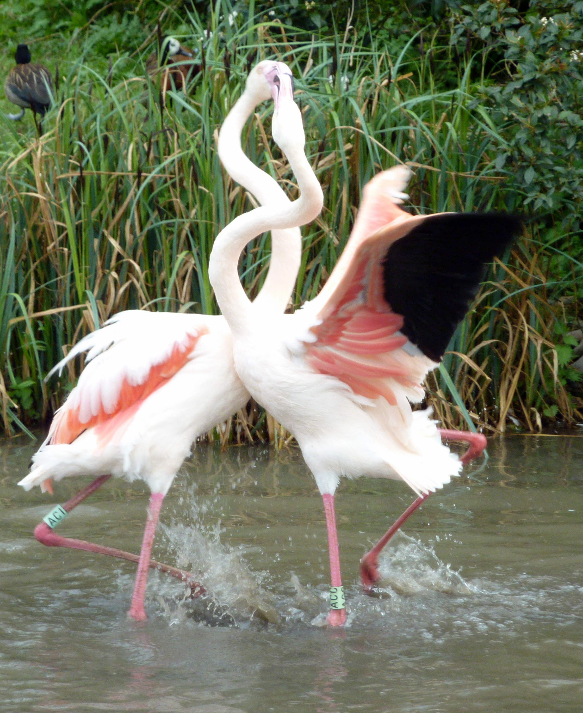 Fighting Flamingos